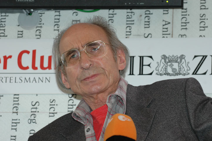 Nur für redaktionelle Nutzung / Editorial use only. Dieses Foto dürfen Sie honorarfrei nutzen, wenn Sie folgenden credit beachten: Copyright: Das blaue Sofa / Club Bertelsmann. Peter Rühmkorf (1929 – 2008) studierte Germanistik und Psychologie in Hamburg und schrieb ab 1953 unter Pseudonym für den „studentenkurier“ (später „konkret“) die Kolumne „Lyrikschlachthof“. 1958-63 war er Verlagslektor, 1964/65 Stipendiat der Villa Massimo in Rom. Er hielt Gastvorlesungen in den USA, war Gastdozent an der Universität Paderborn, Ehrendoktor der Universität Gießen und Freier Schriftsteller. Rühmkorf wurde mit zahlreichen Preisen ausgezeichnet: Erich-Kästner-Preis (1979), Bremer Literaturpreis (1980), Arno Schmidt-Preis (1986), documenta-Schreiber Kassel ( 1987), Heinrich-Heine-Preis (1988) und den Georg-Büchner-Preis (1993).